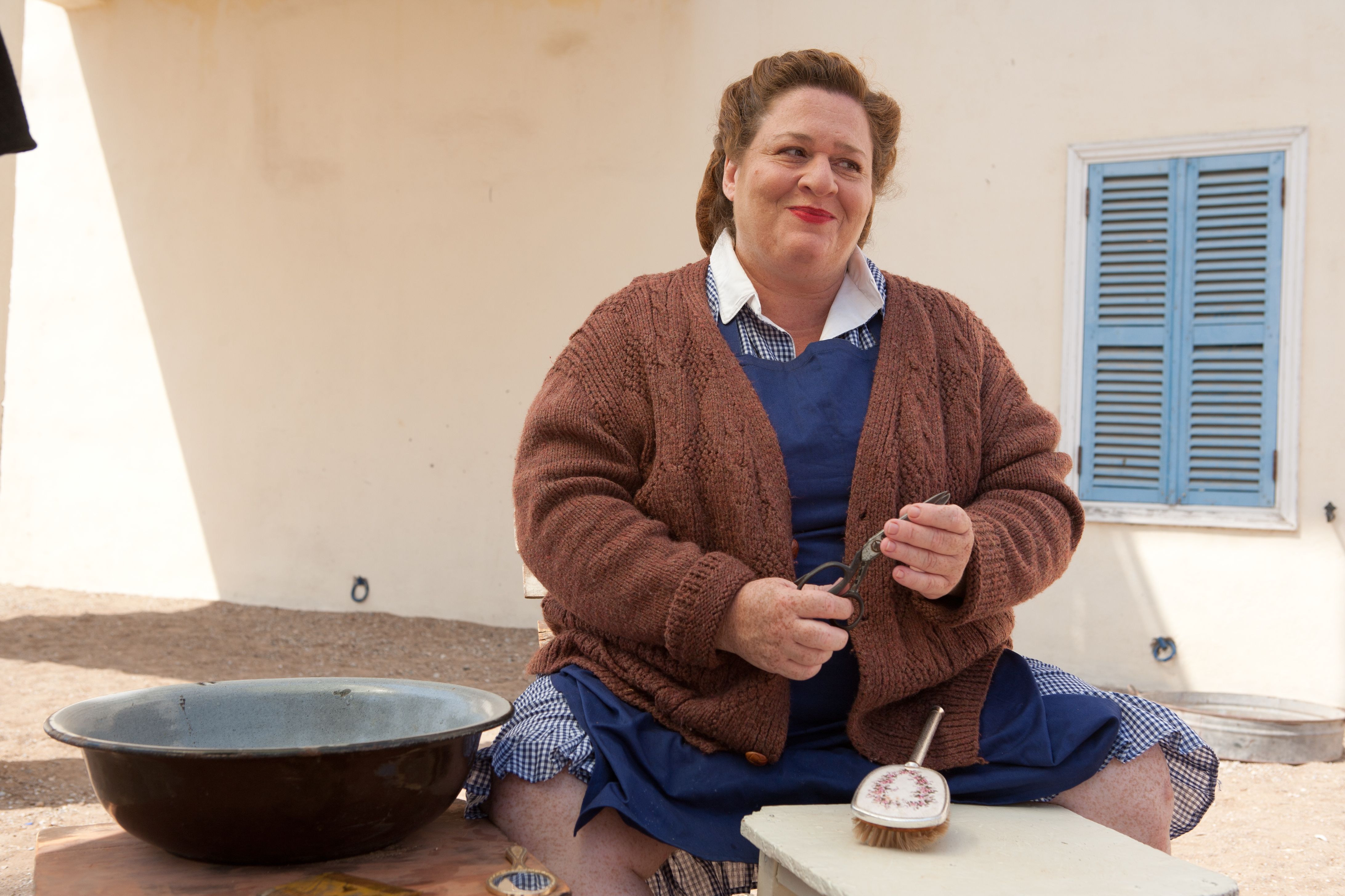 אסתי זקהיים בסרטה של דינה צבי ריקליס ברקיע החמישי